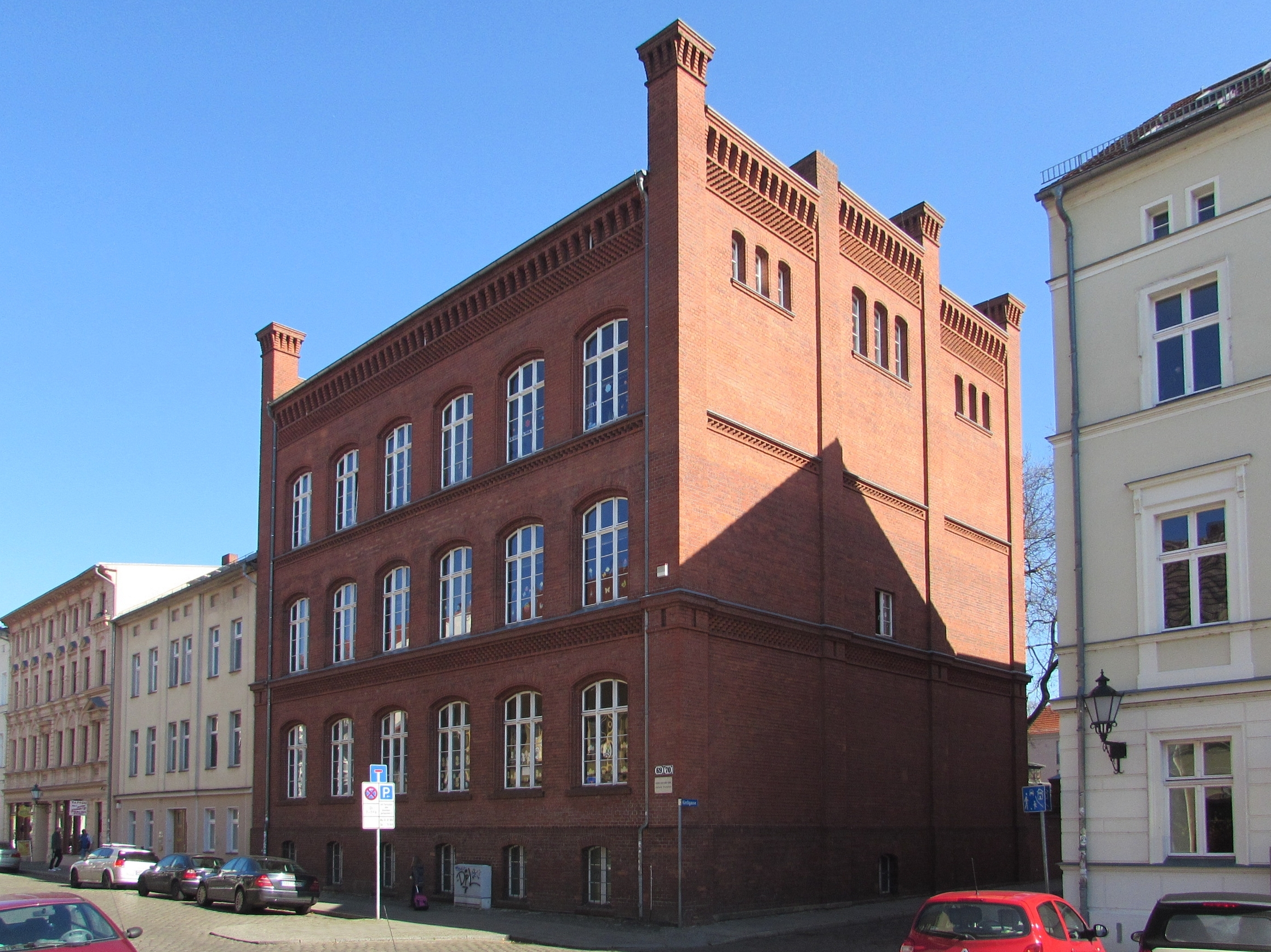 schulhaus kurstraße, brandenburg an der havel, Neustädtische Knabenschule, Frederic-Joliot-Curie-Schule